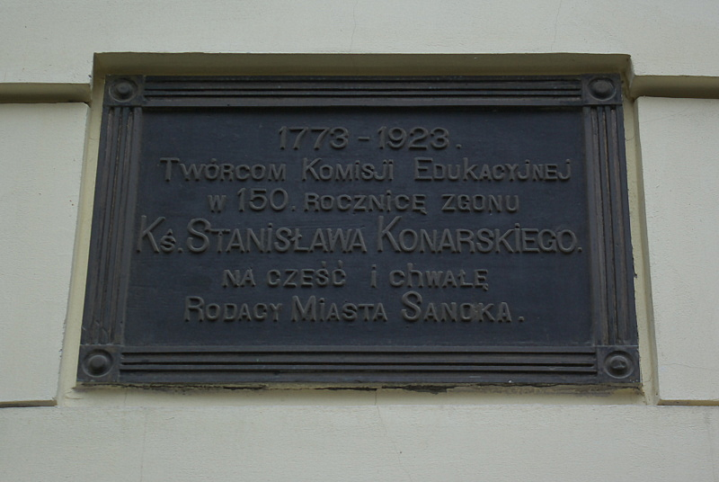 II LO Sanok tablica upamiętniająca Komisję Edukacji Narodowej, w 150 rocznicę śmierci Stanisława Konarskiego 1773-1928